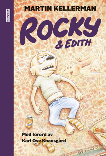 Spesialtegnet omslag til Martin Kellermans "Rocky & Edith", utgitt første gang av Pelikanen 2012